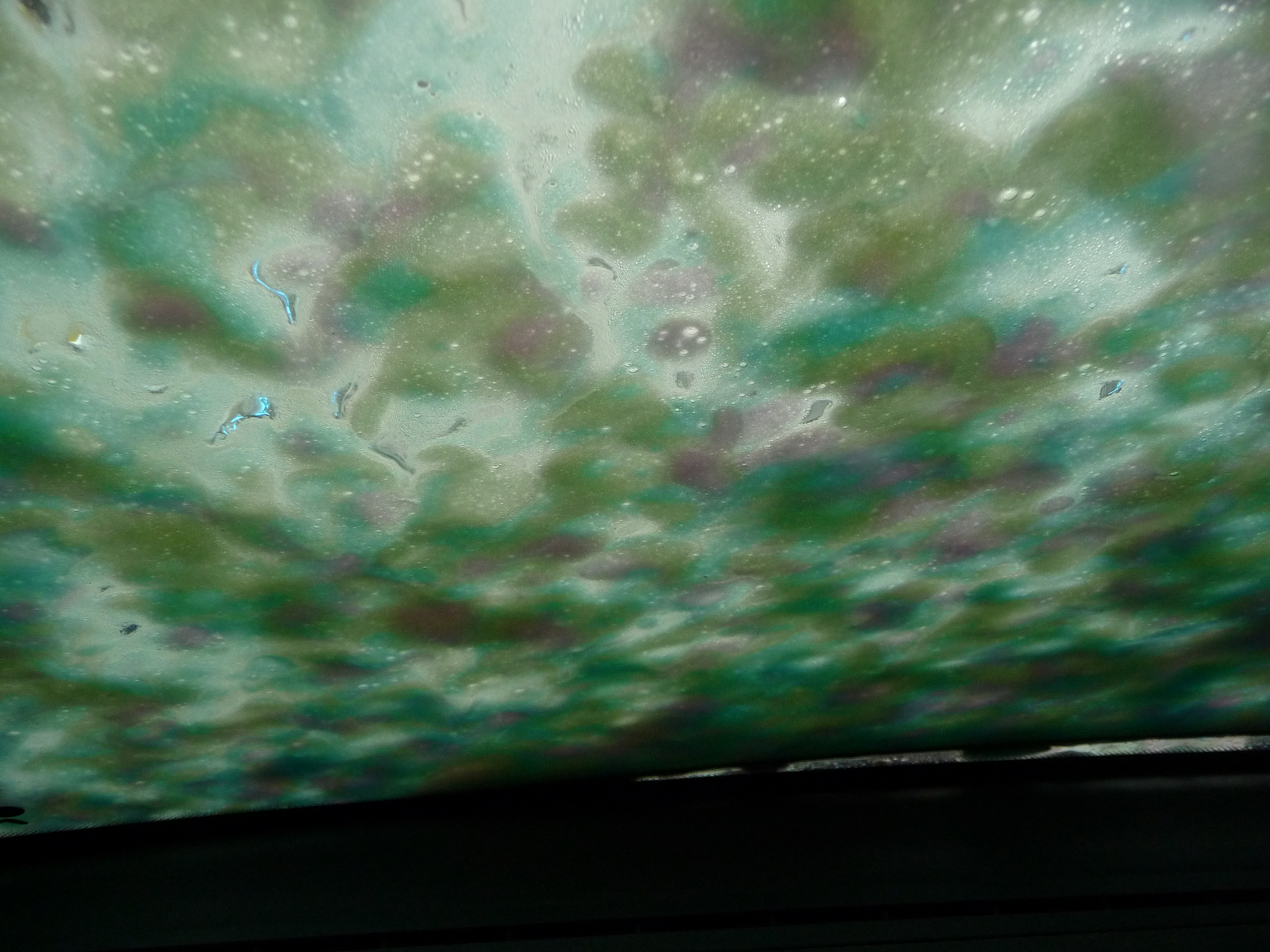 Programm Aktivschaum in einer Autowaschstraße (fotografiert vom Innenraum des Autos)